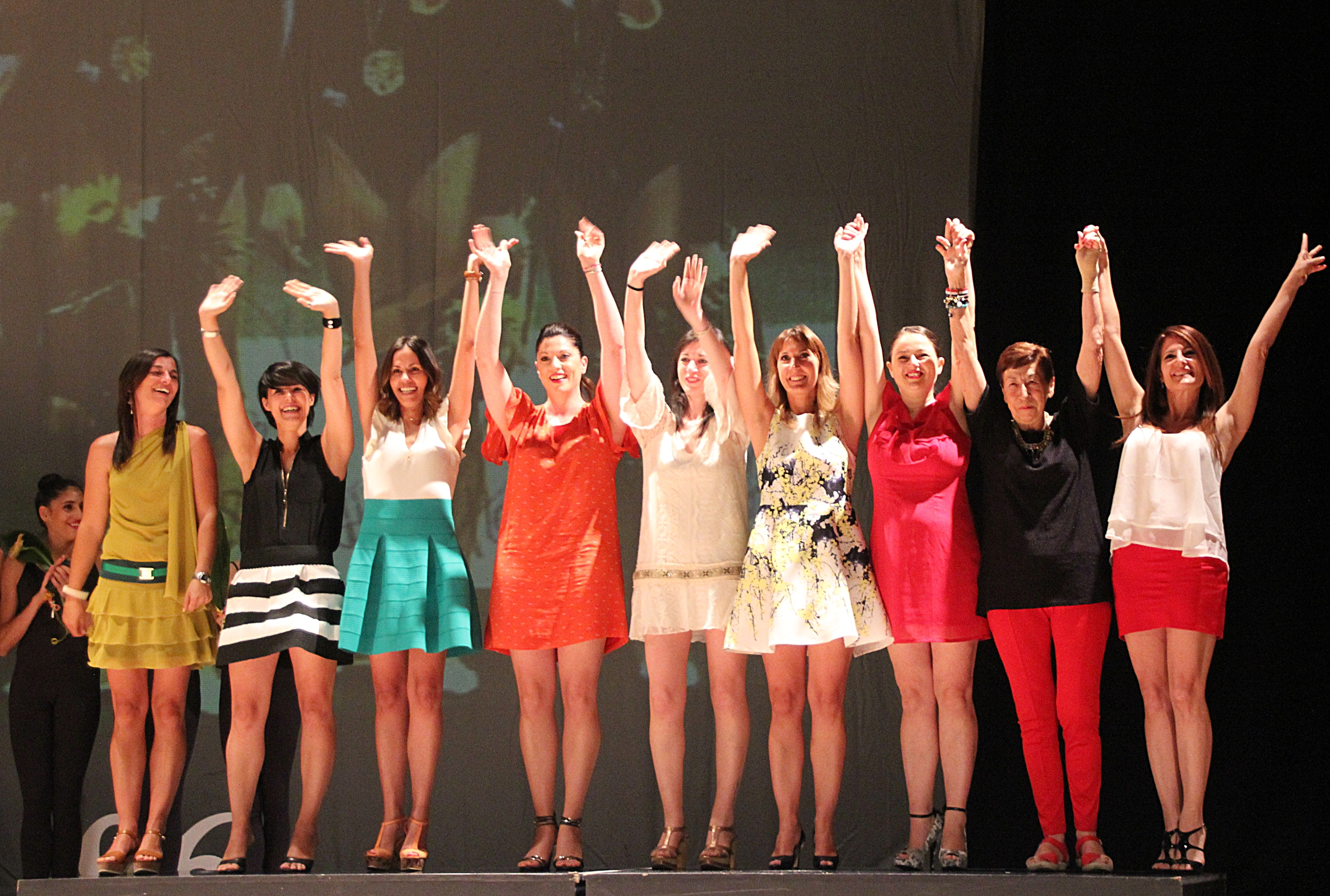 Las Niñas de Oro con Maite Nadal y Marisa Mateo en la Gala 20º Aniversario de la Medalla de Oro de Atlanta '96 en Badajoz (2016).